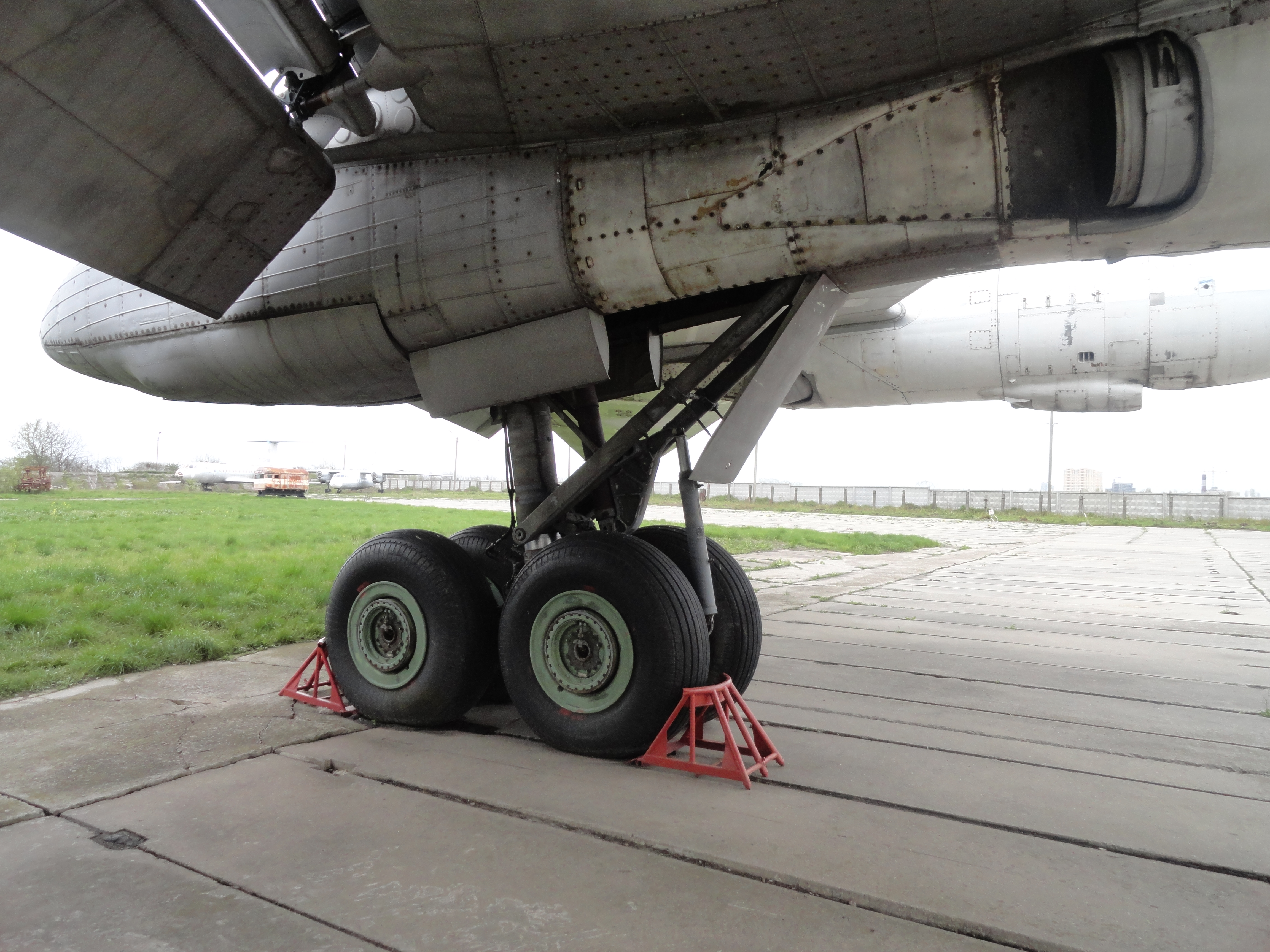 Левая основная стойка шасси самолёта Ту-142. Фото сделано в музее авиации в Киеве.